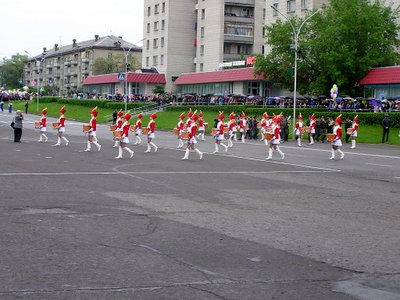 Праздник города Заречного. Фотография центральной площади города во время праздника